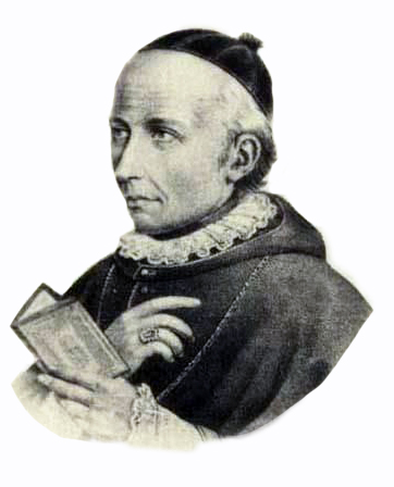 Manuel Vicuña Larraín (* 20 de abril de 1778 - † 3 de mayo de 1843) fue un religioso y parlamentario chileno, que fue designado como el primer arzobispo de Santiago en 1840.